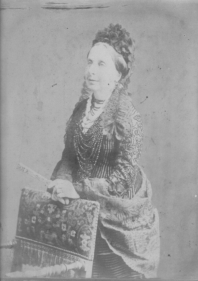 Foto della Duchessa di Galliera Maria Brignole Sale De Ferrari (1811-1888)